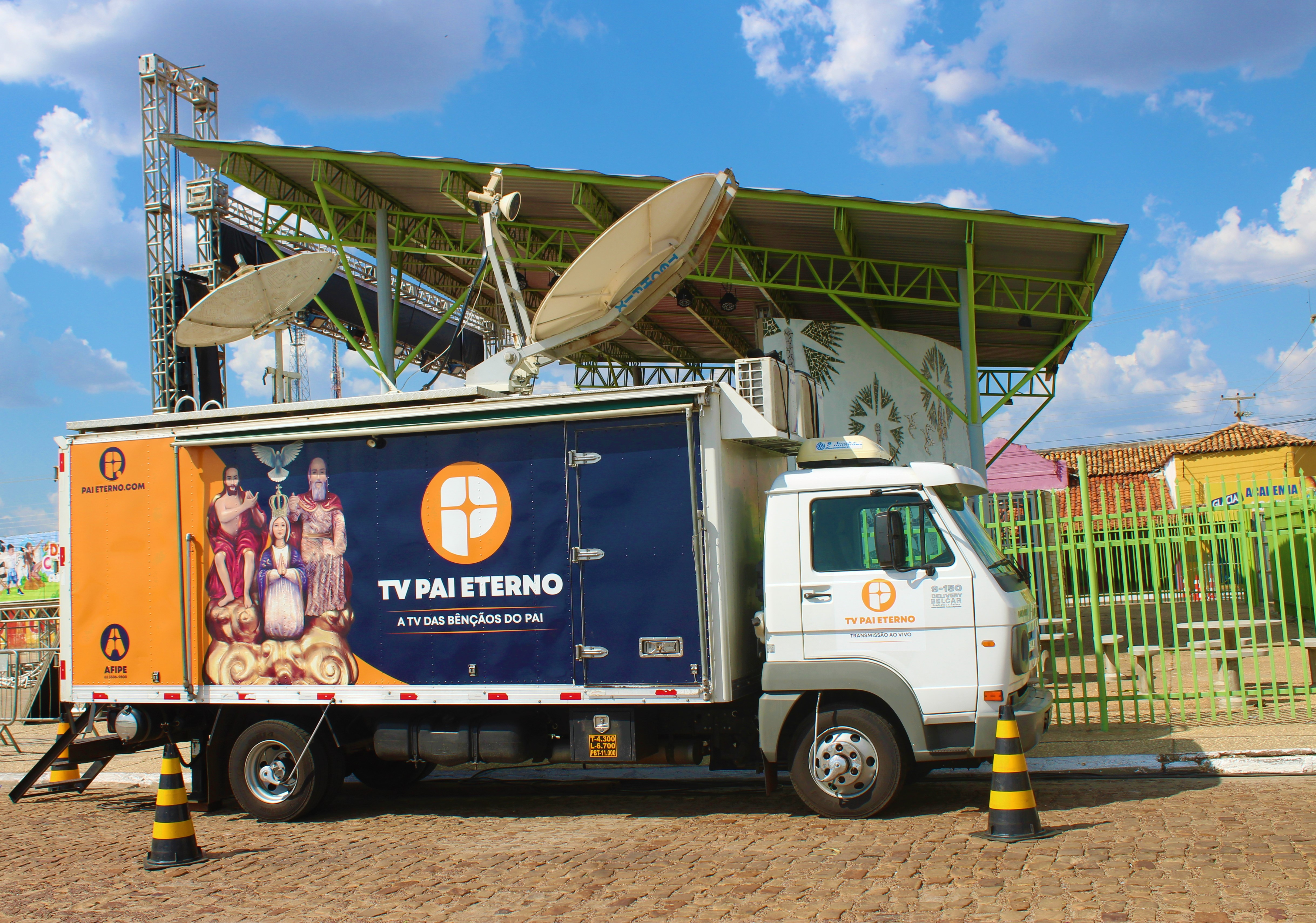 Equipamentos de transmissão da Tv Pai Eterno que para transmitir a missa do padre Robsom.